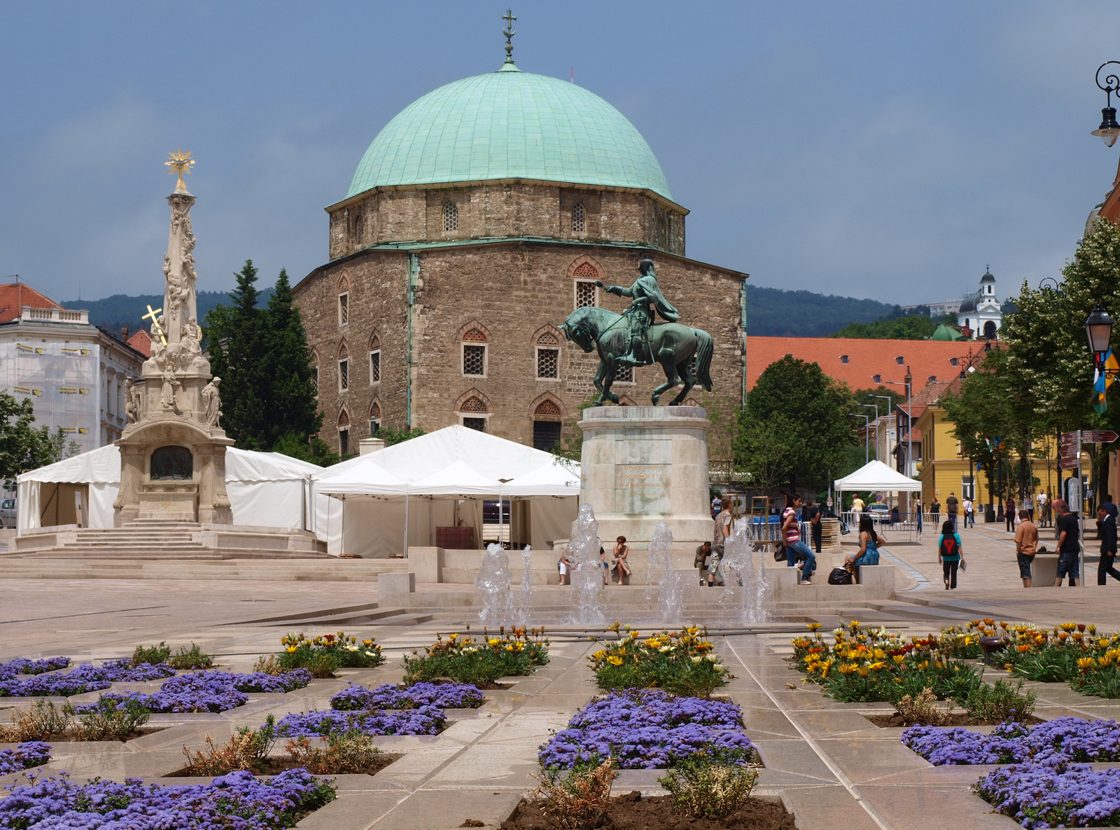 Régi török dzsámi (Pécs, Széchenyi tér) This is a photo of a monument in Hungary, Identifier: 18015